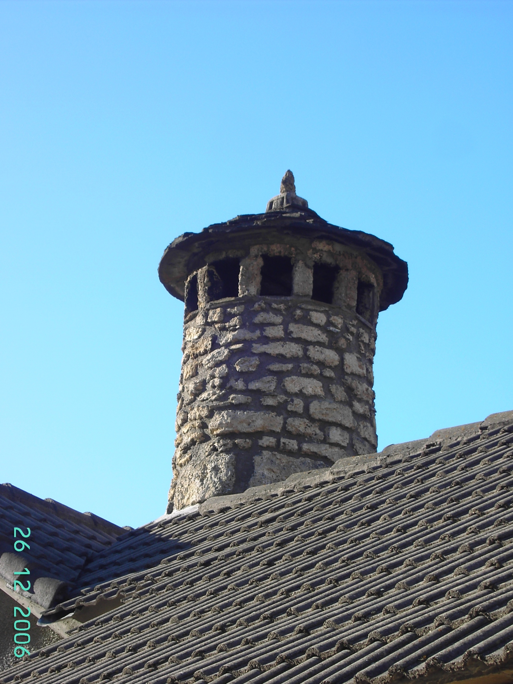 Chimenea troncocónica pirenaica en Torla